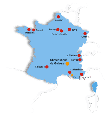 Les Foyers de Charité en France Métropole + DOM TOM